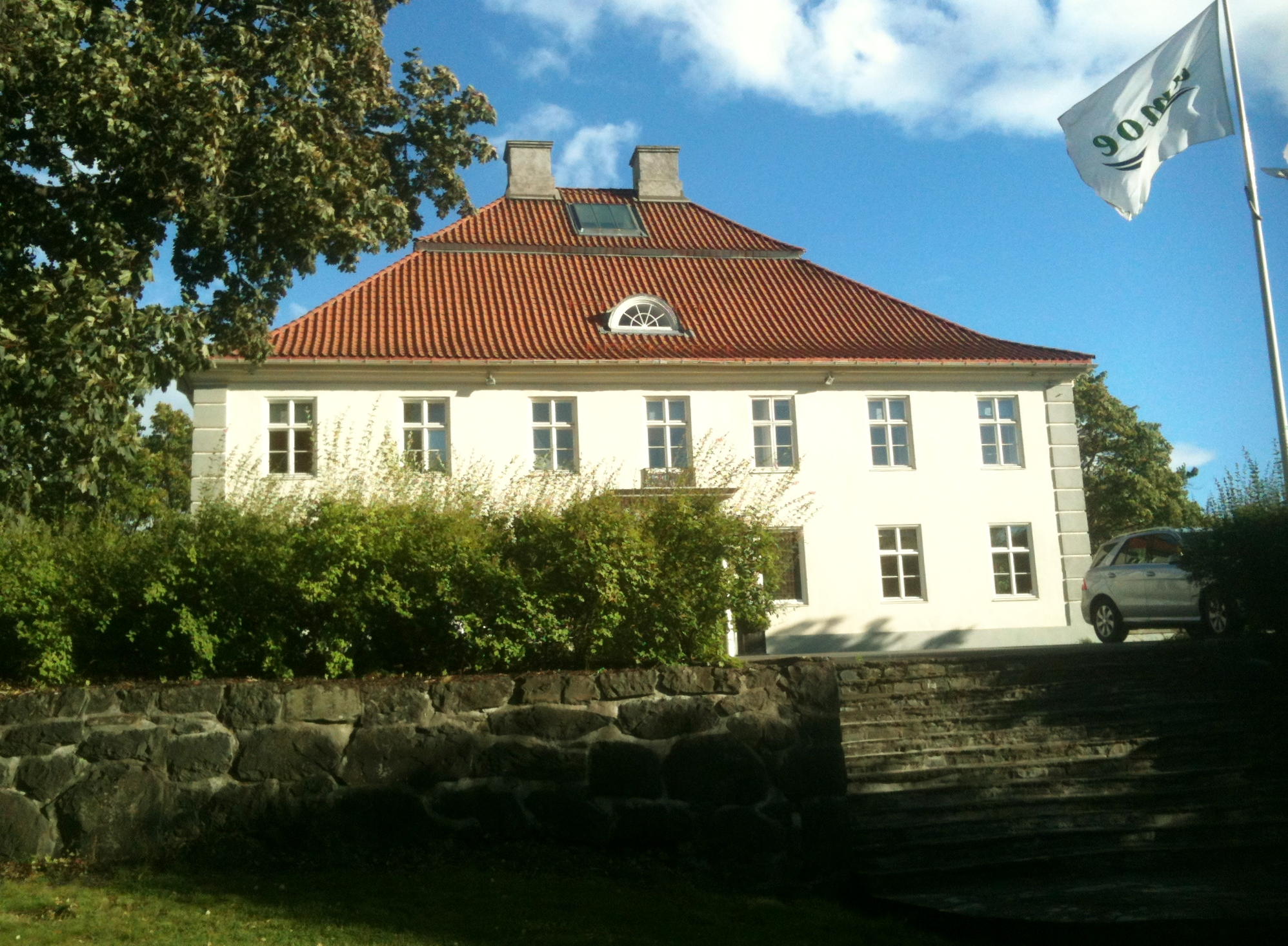 Fornebu hovedgaard, a manor at Fornebu, Bærum (Norway)